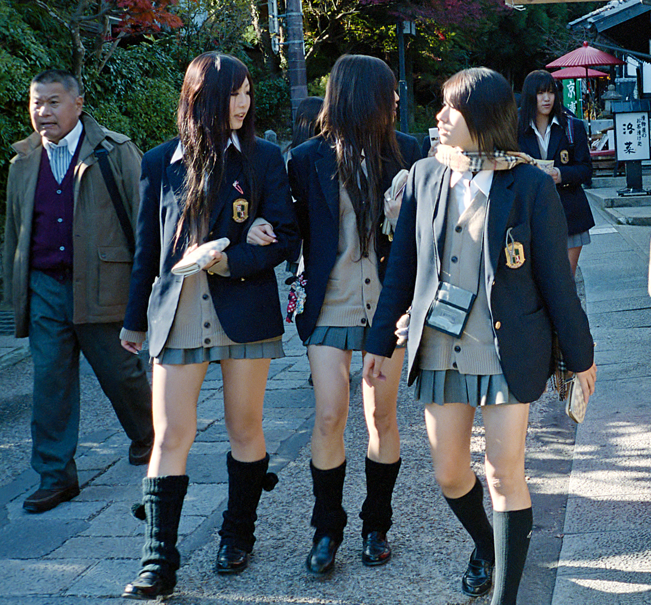 嵐山，洛西。 高校生？